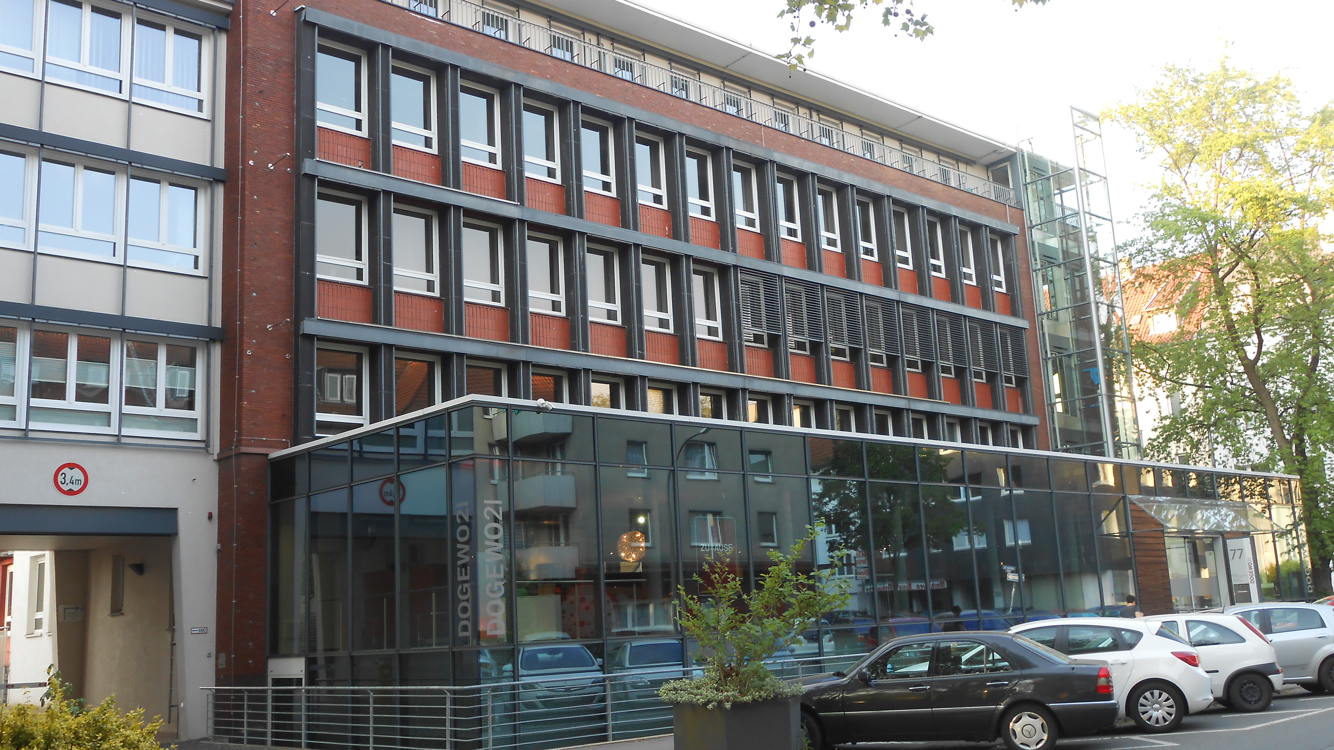 Die DOGEWO-Hauptgeschäftsstelle.